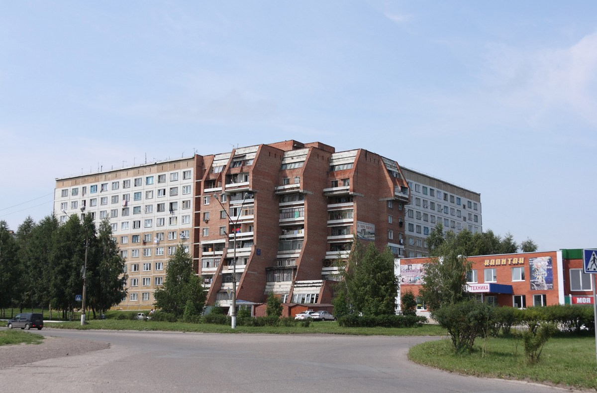 Yurga, Kemerovo Oblast, Russia